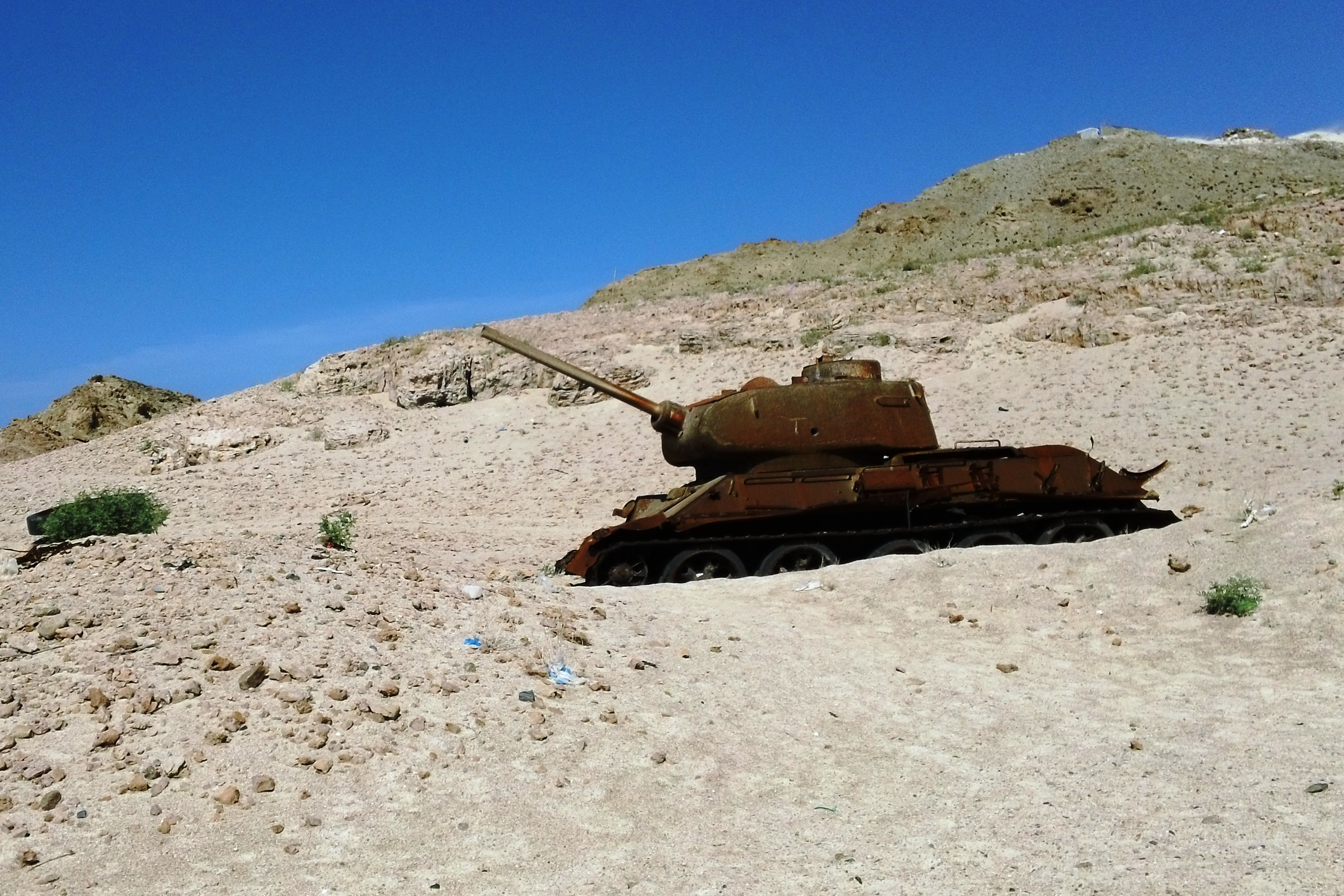 Russian tank